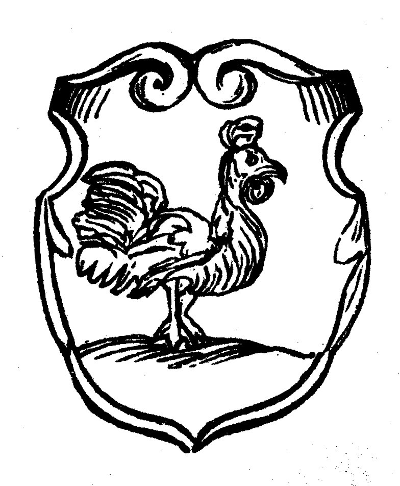 Zdjęcie herbu Kur Biały z herbarza "Herby Rycerstwa Polskiego" Bartosza Paprockiego